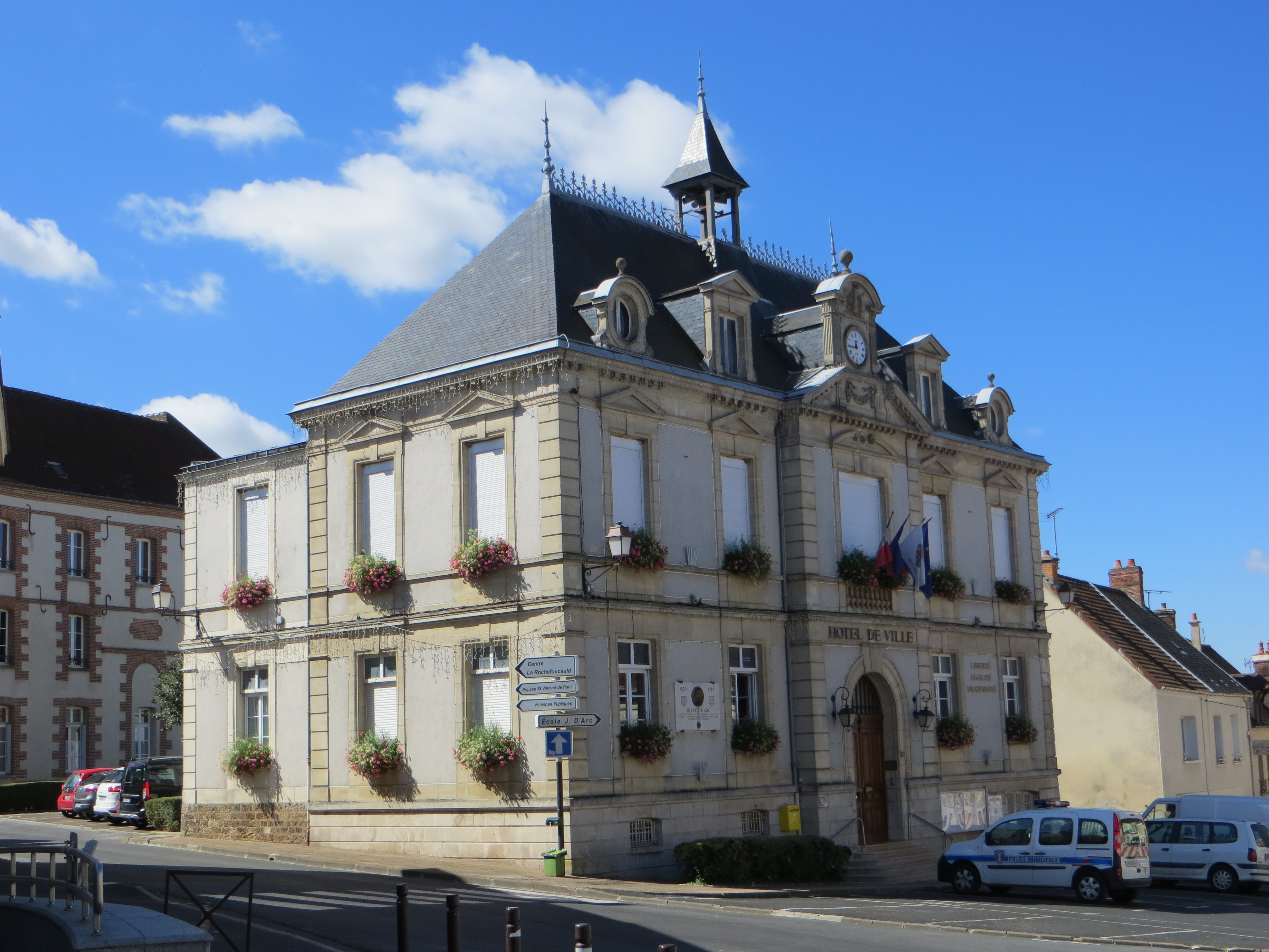 Mairie